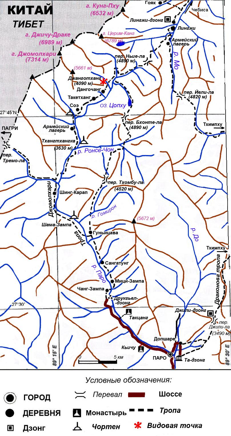 Тропа Джомолхари. Карта составлена по путеводителю Lonely Planet Стэна Армингтона (Тропа Джомолхари вариант I), карта немного дополнена в соответствии с отчётами путешественникам и их соответствию снимков в Google Maps. Самый содержательный отчёт тут Фотографии и дневники Марка Хорелла.